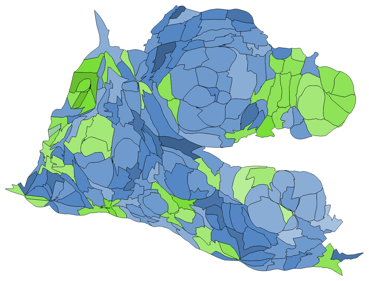 顏色對照表